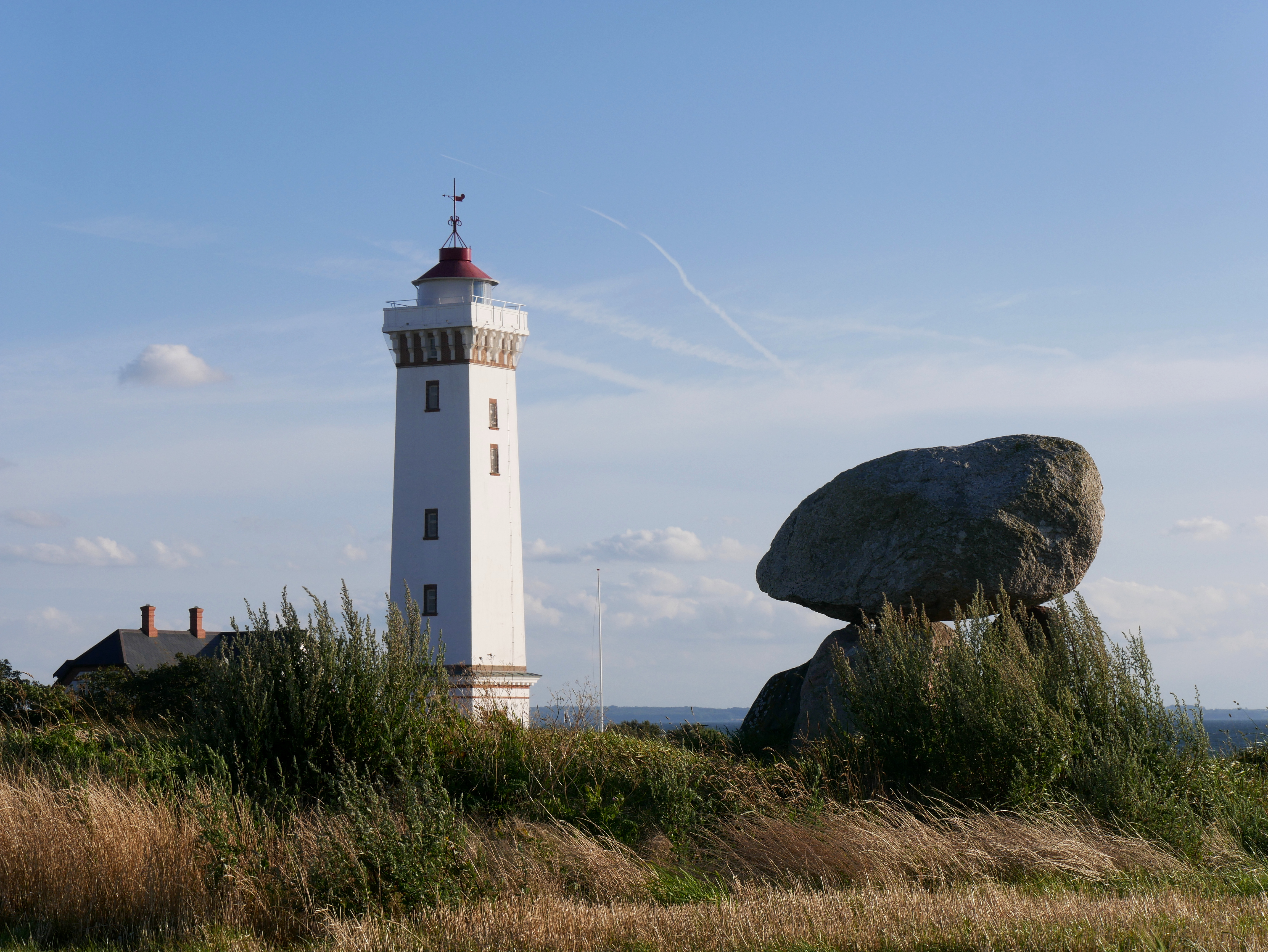 Megalithgrab 1 beim Leuchtturm von Helnaes. Die freistehenden Reste einer Nord-Süd orientierten trapezoiden Kammer bestehen aus je zwei Tragsteinen im Westen und Osten, von denen einer in die Kammer ragt. Der große Deckstein ruht auf drei Tragsteinen. Die Nord- und die Südseite sind offen. Der Dolmen liegt in den Resten seines Hügels in der Nähe des Leuchtturms Helnæs Fyr. Blick von Norden nach Süden mit dem Leuchtturm Helnaess Fyr.